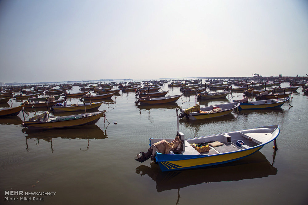 بندر کُنگ یکی از شهرهای بخش مرکزی شهرستان بندر لنگه در استان هرمزگان واقع در جنوب ایران است. بیشتر اهل کنگ به زبان فارسی تکلم می‌کنند، اما نوشته‌های آنها به زبان عربی است و نامه‌ها و سندها را به زبان عربی تدوین می‌نمایند. ۵۸هکتار از بافت تاریخی بندر کنگ (که تقریبا یک دوازدهم از مساحت کل شهر را شامل می‌شود) سال۸۱ در فهرست آثار ملی ثبت شده است. همچنین مقدمات ثبت شدن بندرکنگ در فهرست میراث جهانی یونسکو نیز در حال انجام است. بندر کنگ در گذشته یکی از مراکز مهم ساخت لنج های سنتی و چوبی بوده است و ناخدا ها از دیگر بنادر جنوب برای خرید لنج به این بندر می آمدند. شغل اکثریت مردم این بندر با دریا و دریانوردی در ارتباط است . در گذشته از این بندر به نقاط مختلف مثل بصره ، مسقط ، هندوستان و آفریقا سفر میشد و تبادل تجاری با این کشور ها وجود داشت. از این رو برخی فرهنگ ها و آداب نیز از آنجا وارد فرهنگ مردم این بندر گردید.